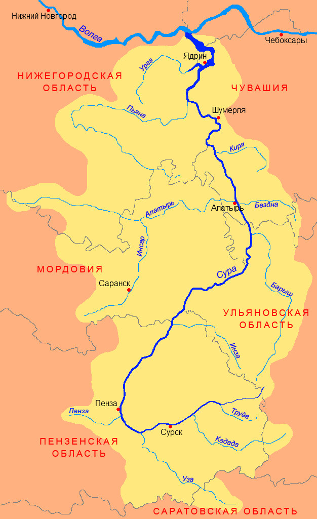 Схема бассейна реки Сура (исправленная)